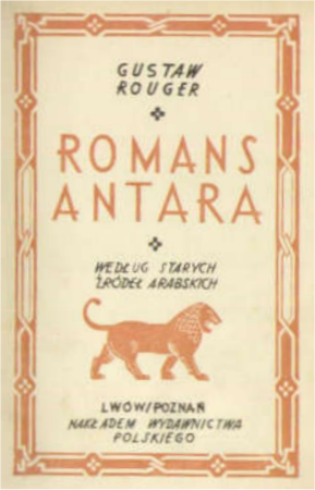 Okładka książki "Romans Antara", Wydawnictwo Polskie R. Wegnera